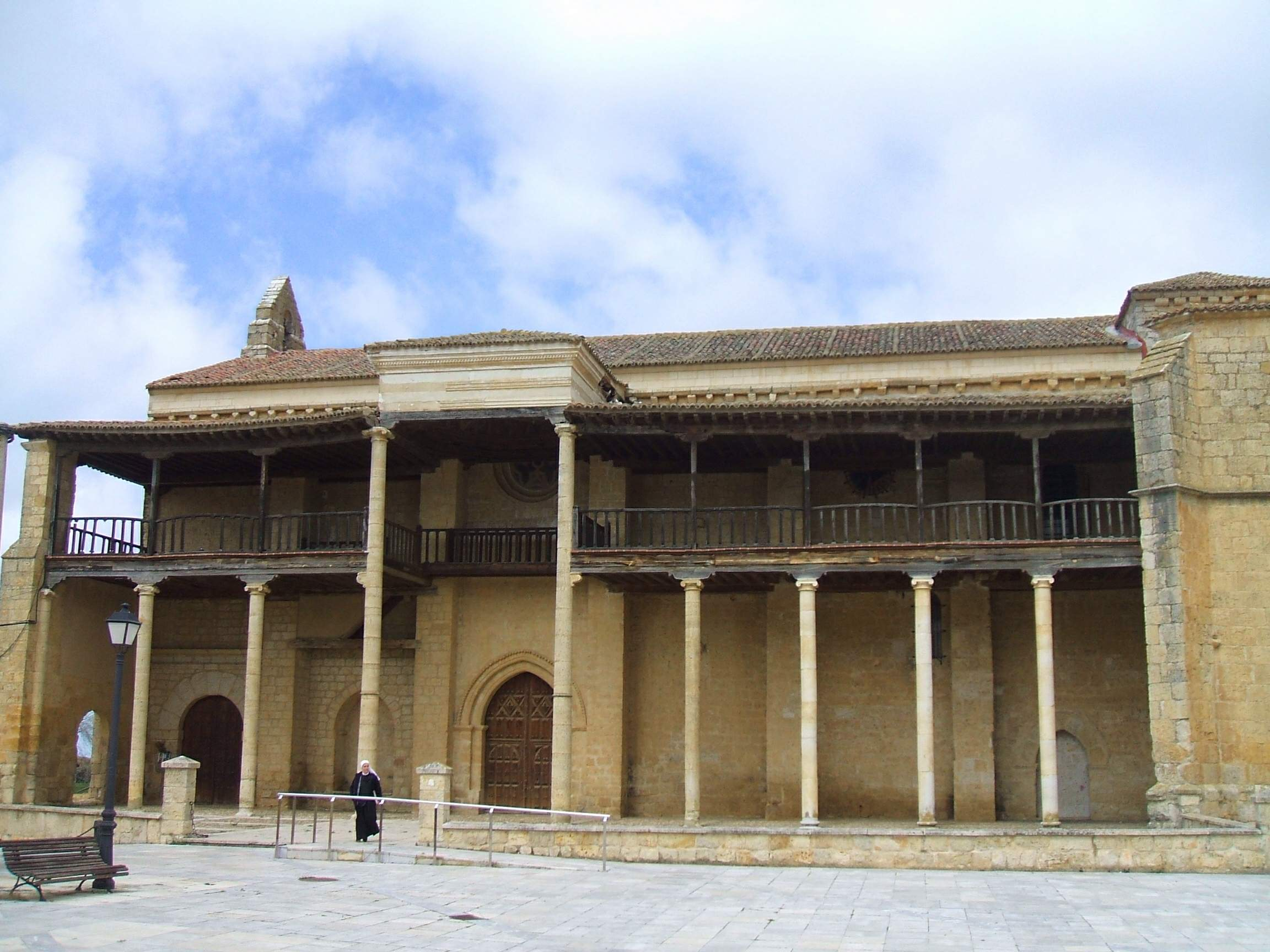 Iglesia-Museo de Santa María (Becerril de Campos)